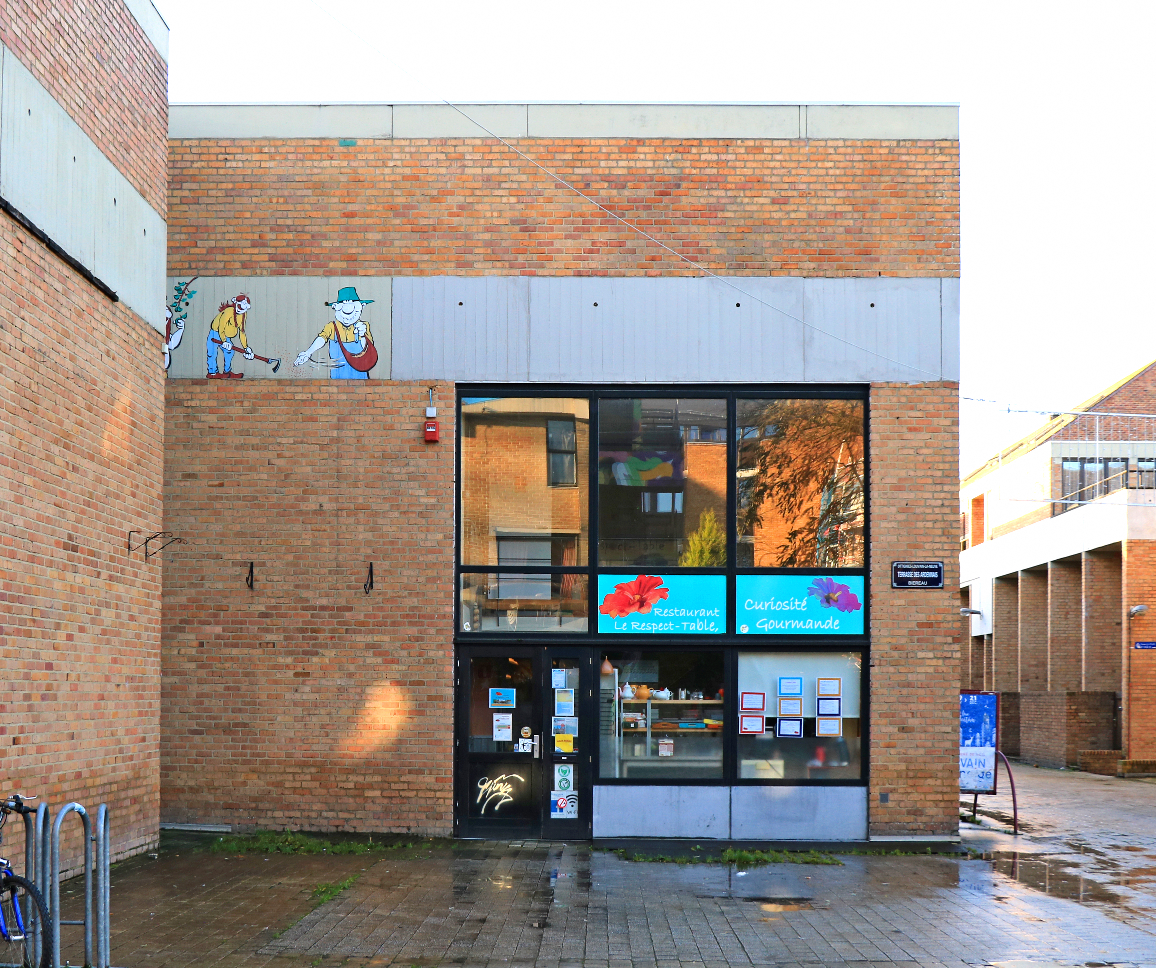 Belgique - Louvain-la-Neuve - Ancien cercle Agro (rampe des Ardennais)